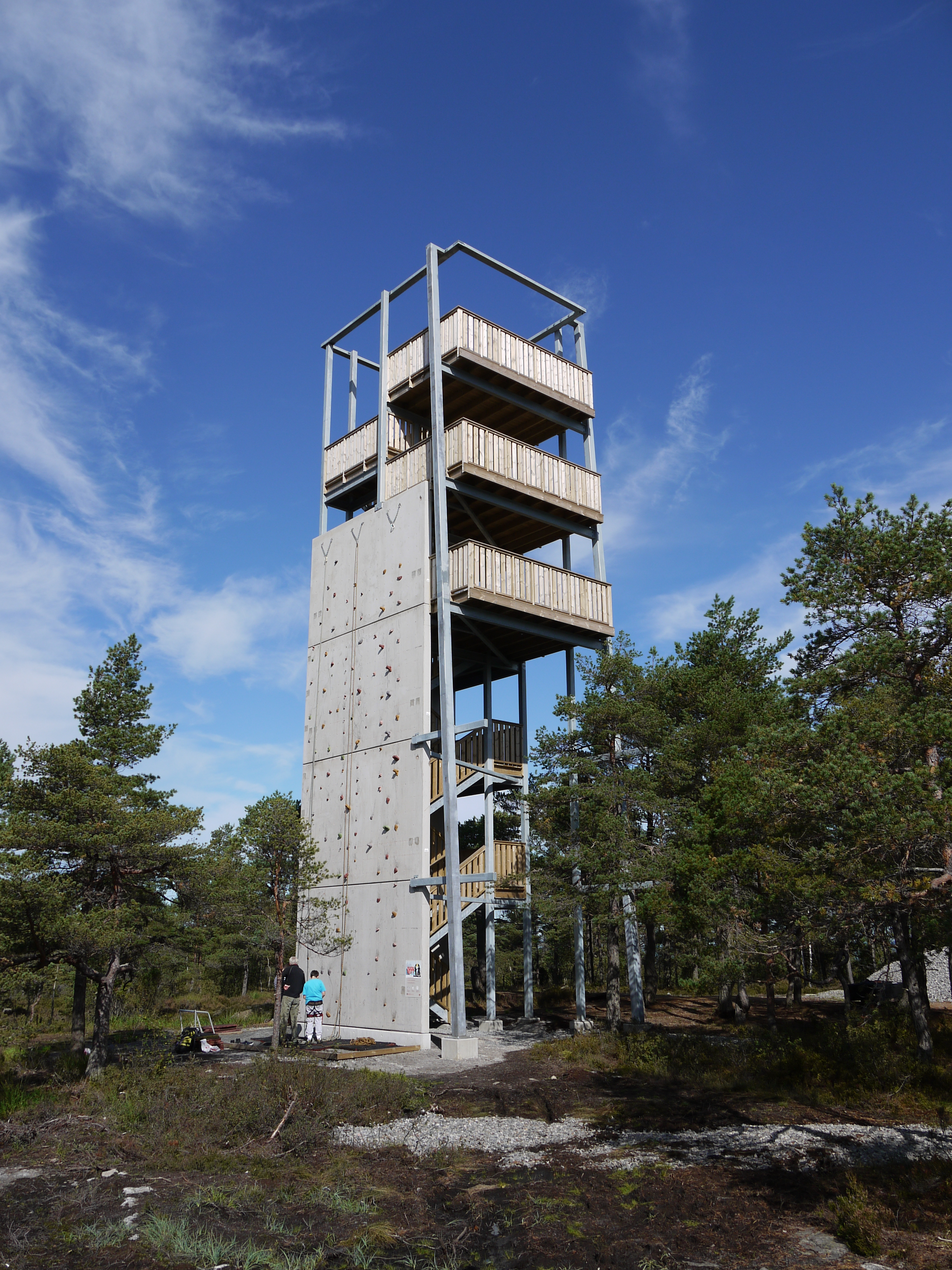 Høiåstårnet september 2011